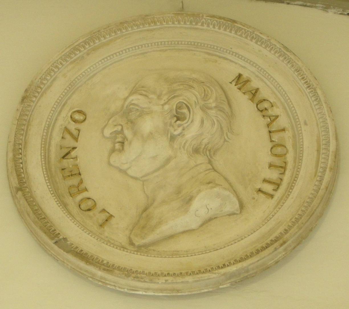 Specola, medaglione di lorenzo magalotti